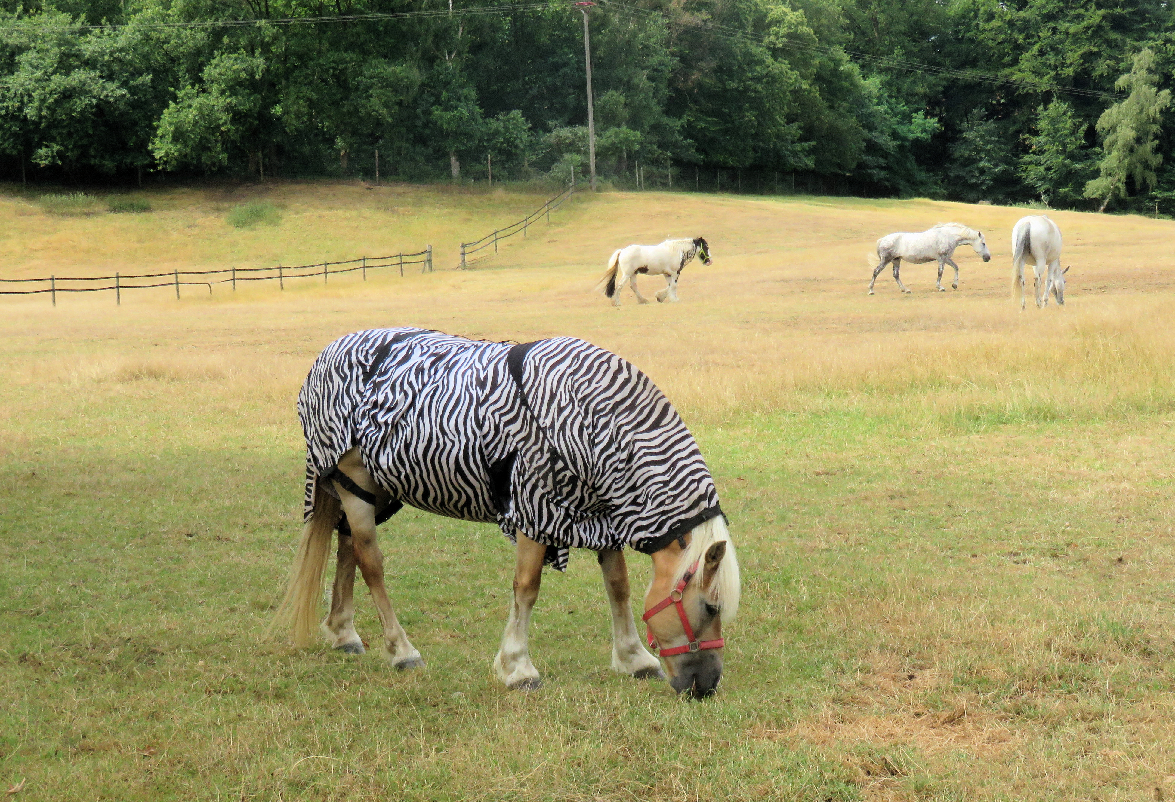 Pferd mit zebra-farbiger Decke